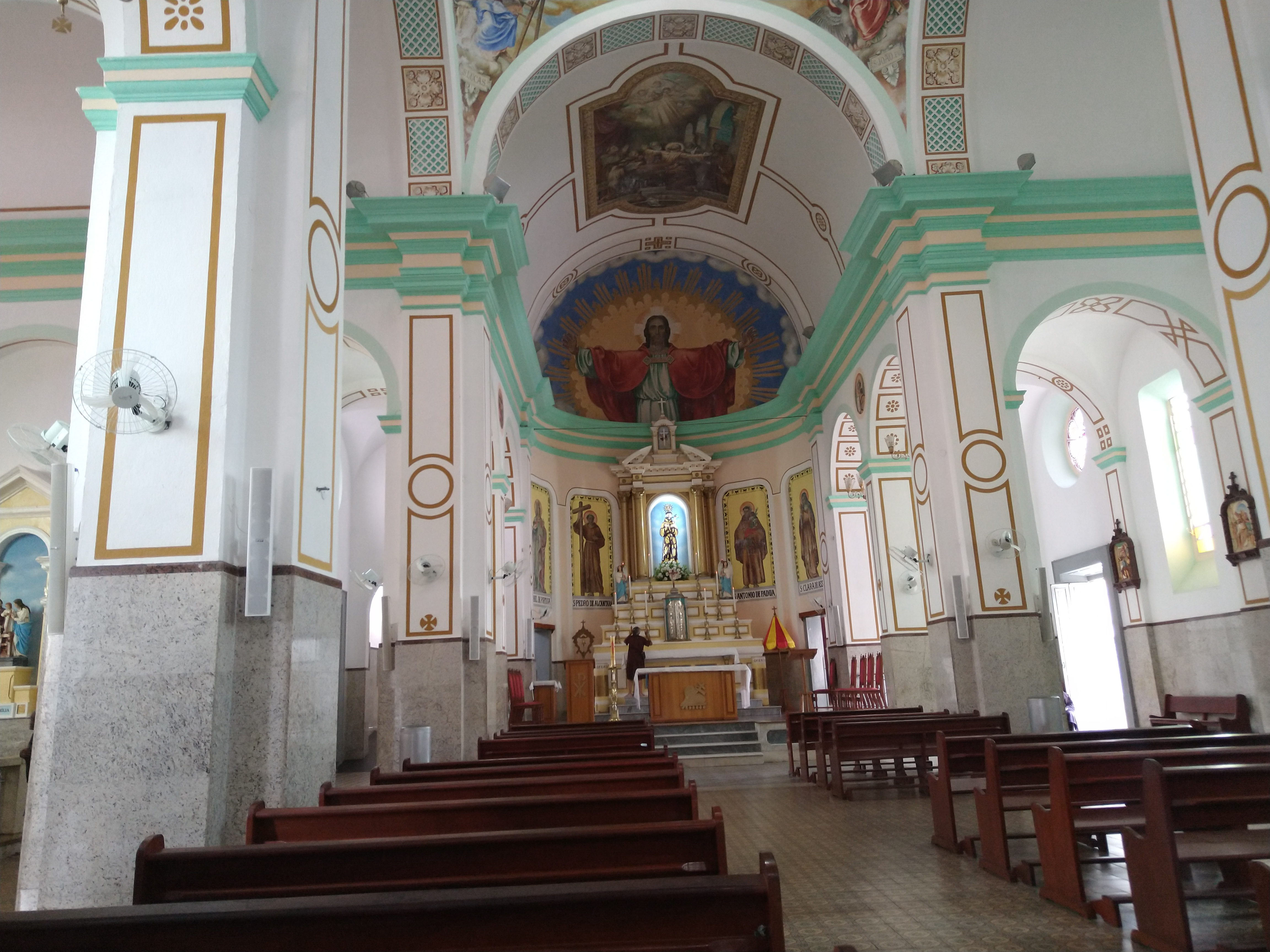 Localizada em Canindé - Ceara